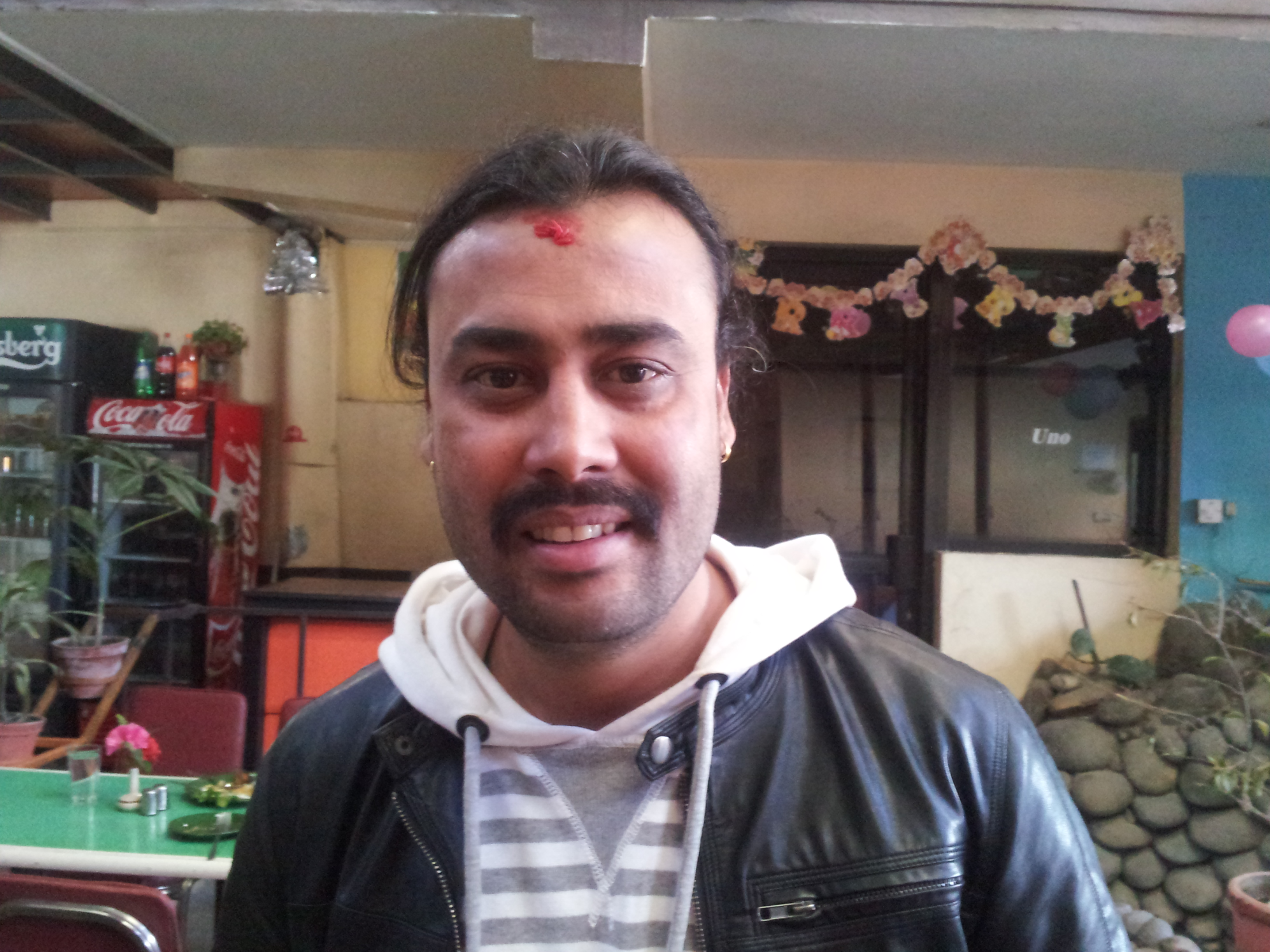 Satyaraj Acharya 2013